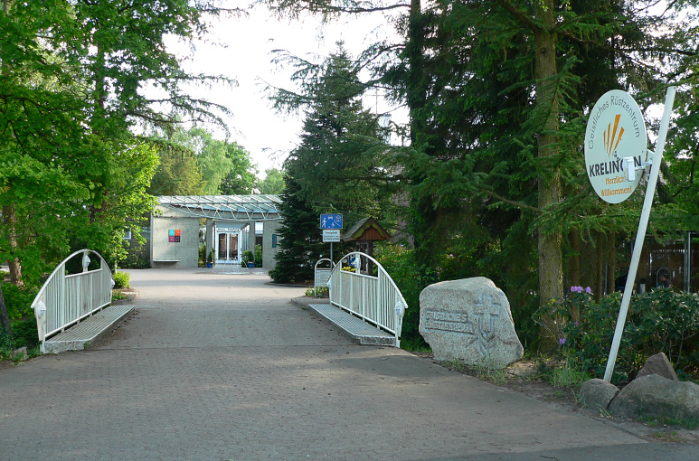 Eingang Geistliches Rüstzentrum Krelingen